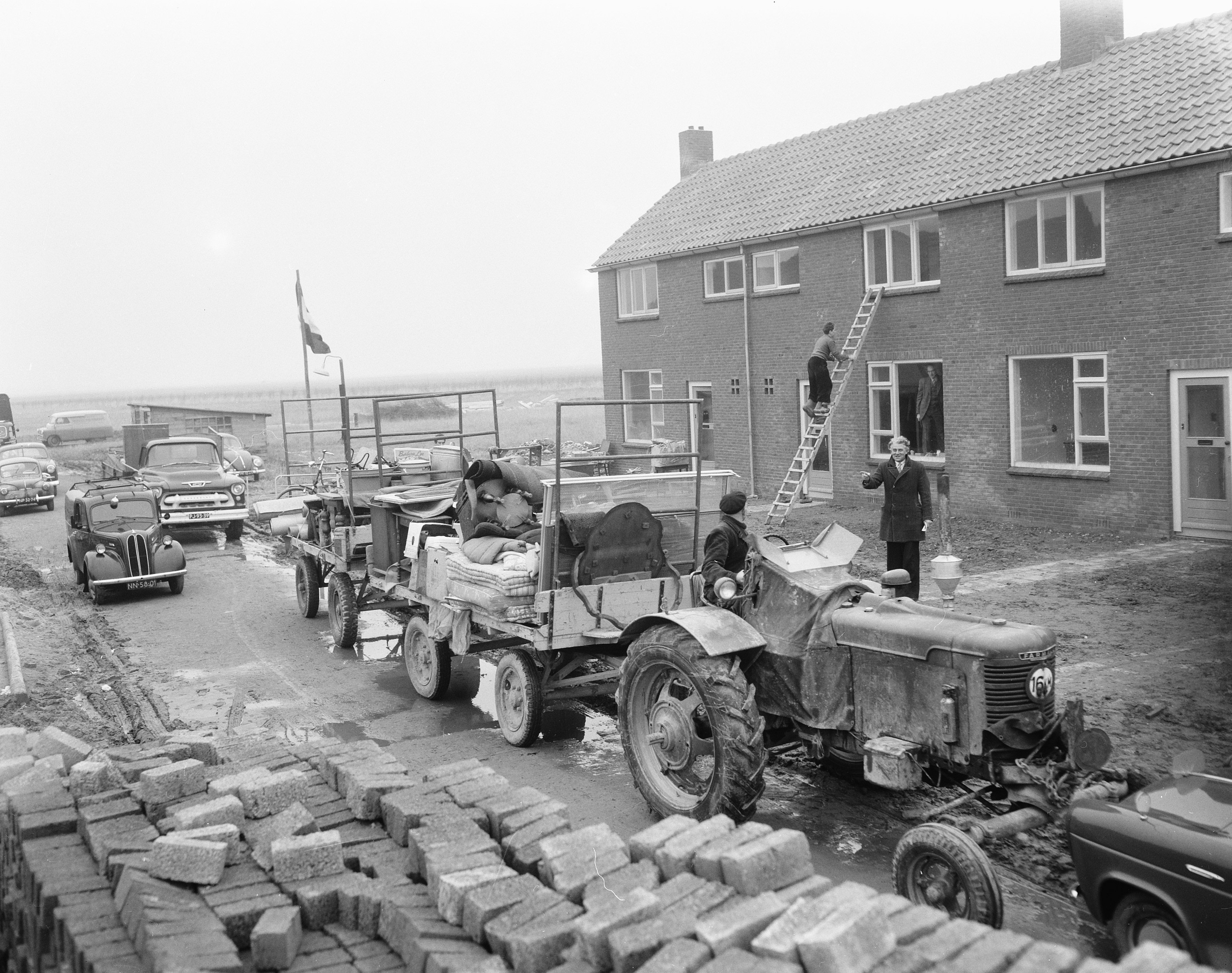 Collectie / Archief : Fotocollectie Anefo Reportage / Serie : [ onbekend ] Beschrijving : Aankomst nieuwe bewoners te Kreyleroord, nieuw dorp in Wieringermeer Datum : 21 januari 1957 Locatie : Noord-Holland, Wieringermeer Trefwoorden : AANKOMST, bewoners, dorpen Fotograaf : Pot, Harry / Anefo Auteursrechthebbende : Nationaal Archief Materiaalsoort : Negatief (zwart/wit) Nummer archiefinventaris : bekijk toegang 2.24.01.04 Bestanddeelnummer : 908-2546